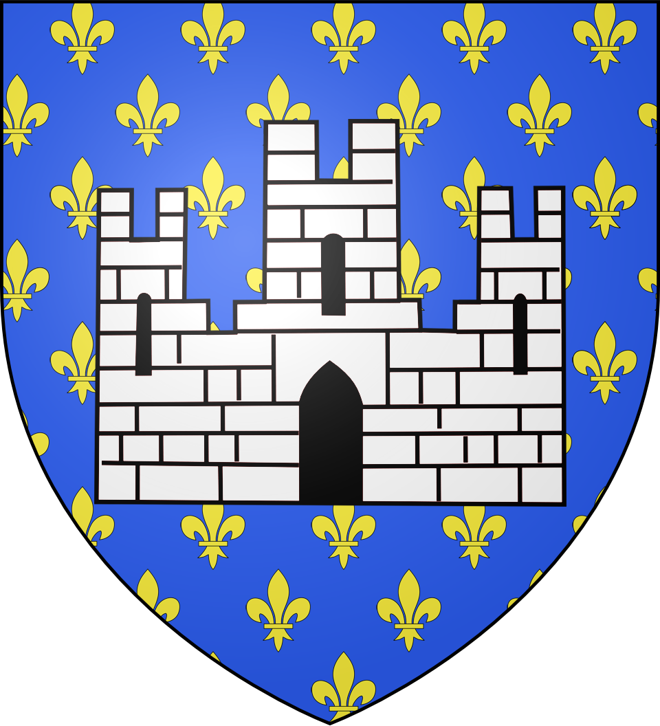 d'azur semé de fleurs de lis d'or, au château donjonné de trois tours d'argent maçonné de sable, brochant sur le tout